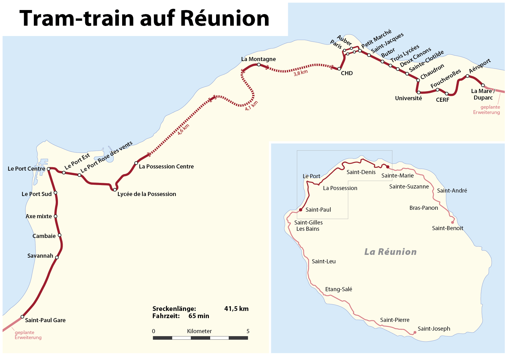 Tram-Train-Strecke auf Réunion